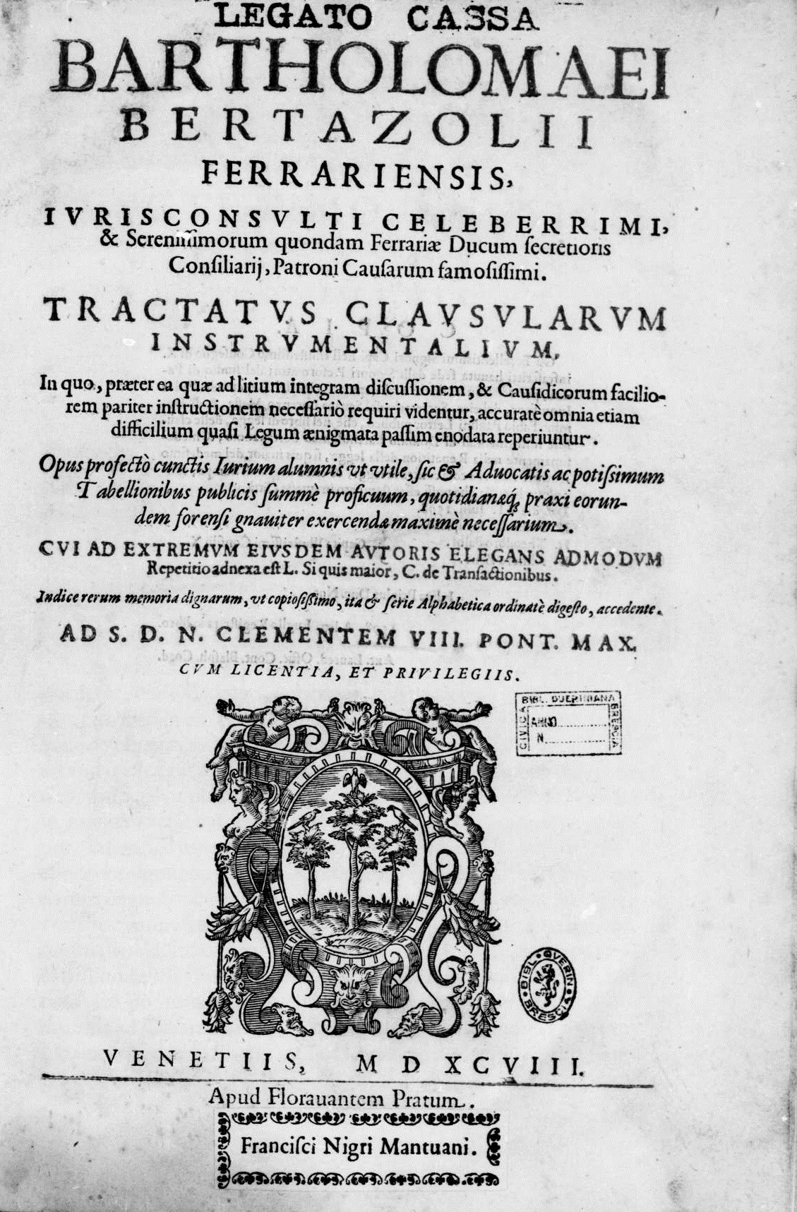 Frontespizio